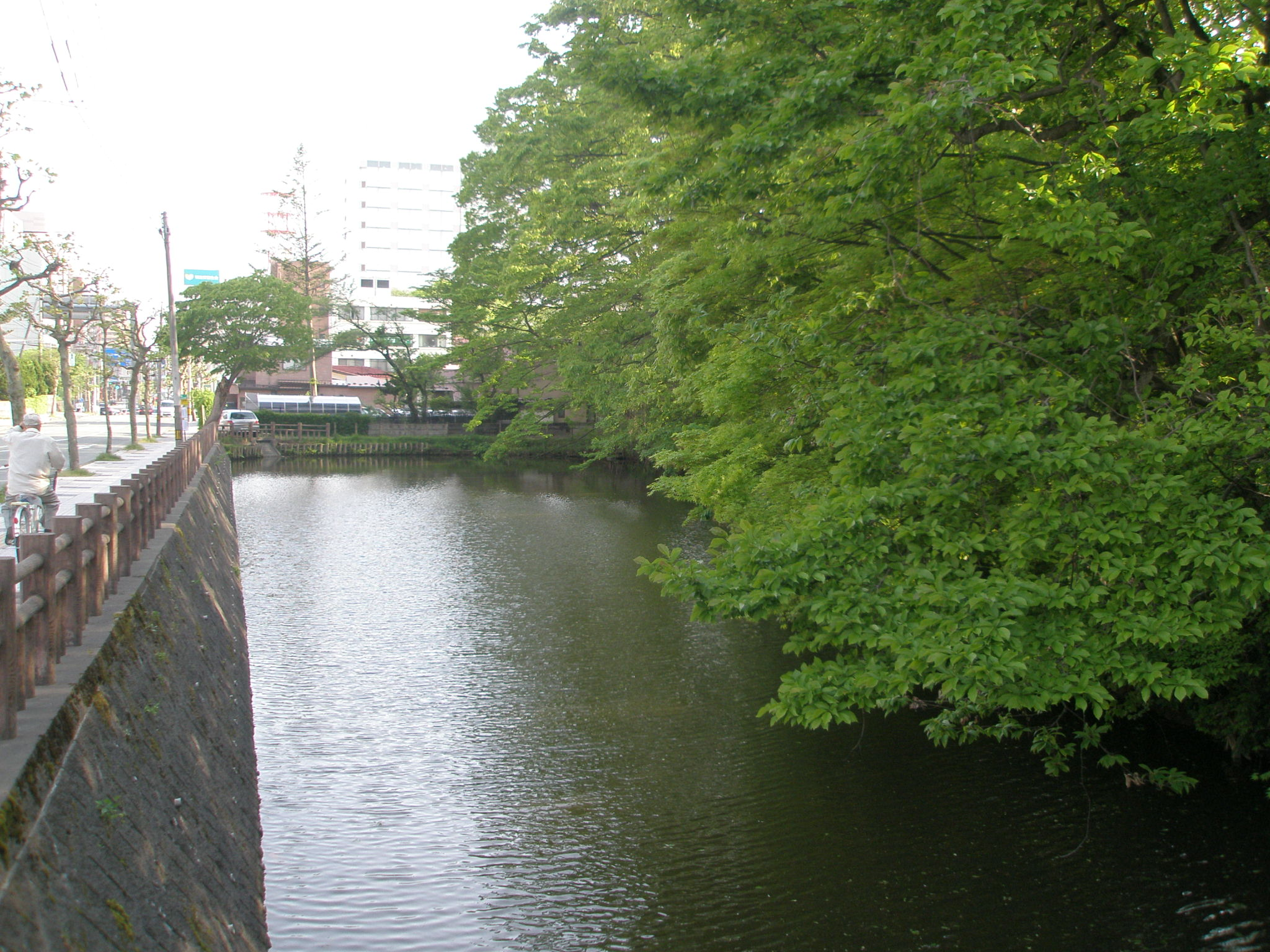 千秋公園の東側に位置する黒門の堀。唐金橋跡によって南北に分断されている。南側（アトリオン方向）を撮影